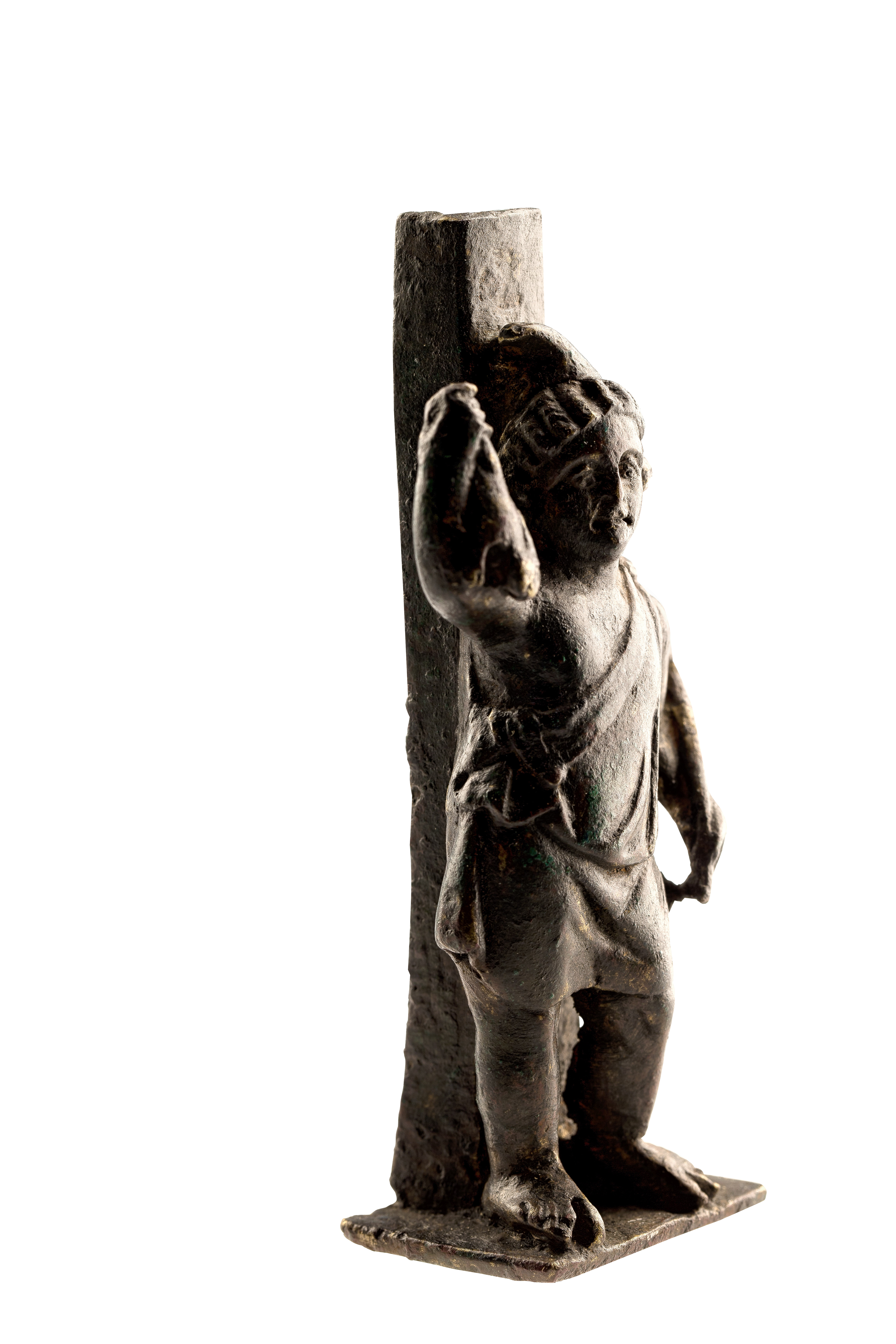 Figurine van Attis in brons, 75 tot 150 NC, vindplaats: Tongeren, Kielenstraat, 1992, collectie Gallo-Romeins Museum Tongeren, TO92/020/093